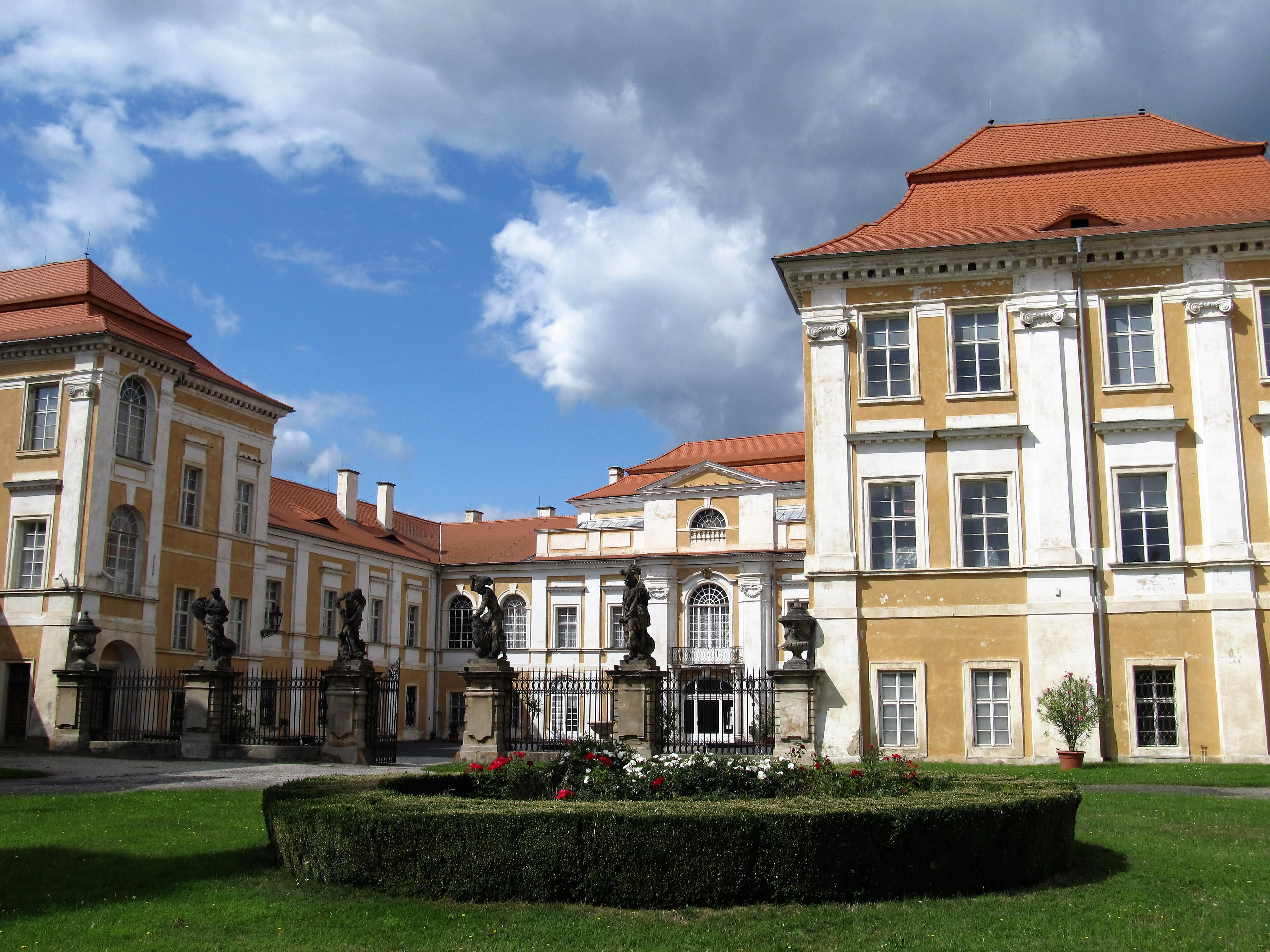 Nádvoří duchcovského zámku